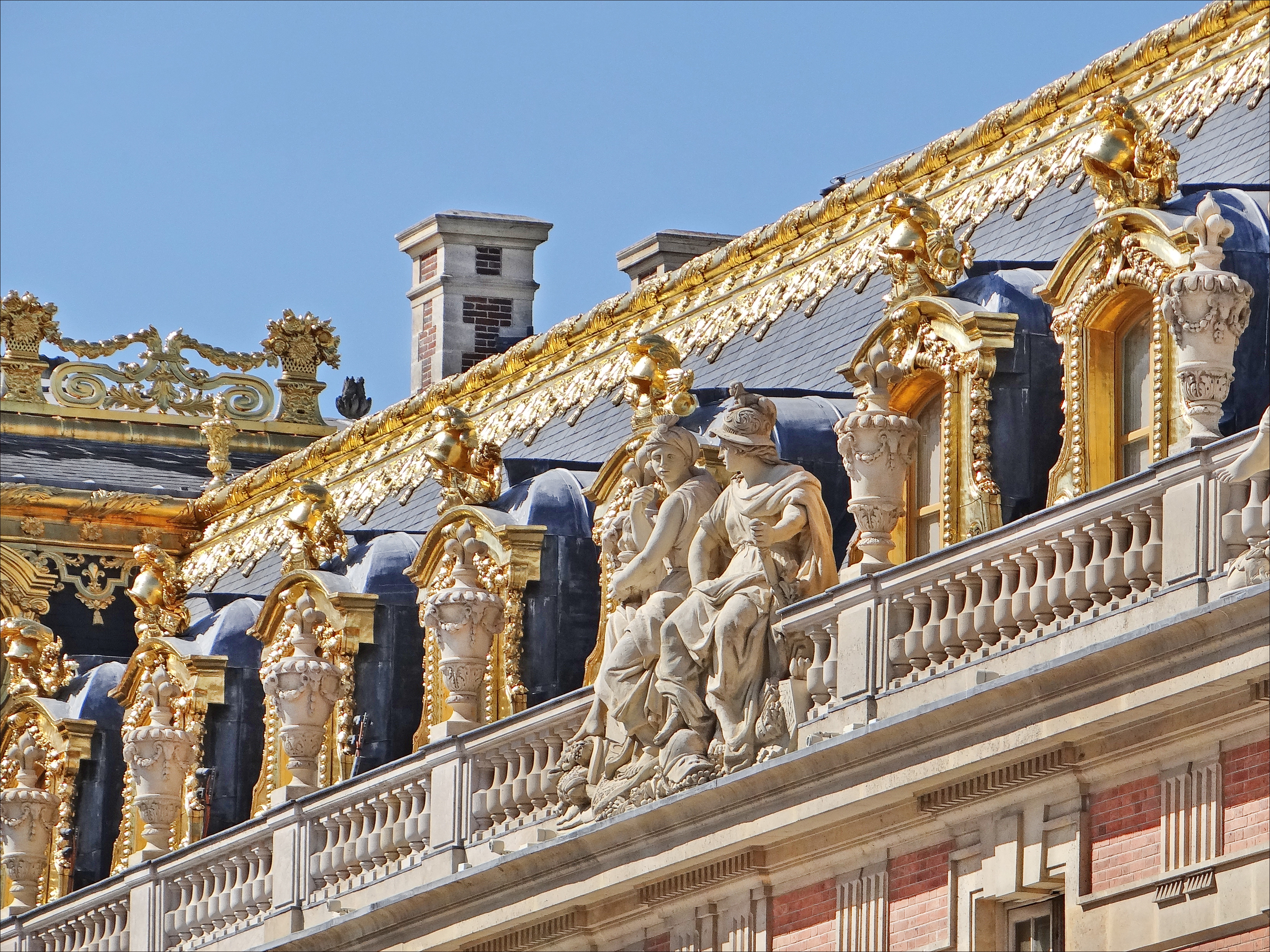 La frise décorative située à gauche sur les toits des bâtiments de la cour de marbre a été réalisée par François Girardon et Jean-Baptiste Tuby en 1680 et 1681. Les ornements de faîtage, en plomb et étain, ont été réalisées par Etienne Le Hongre, Noël Jouvenet et Pierre Mazeline de 1680 à 1684. Ces décors ont été redorés dans le cadre de la restauration de la cour de marbre à partir de 2006. Sur la balustrade qui court autour de la cour de Marbre et de la Cour royale, dix-huit statues en ronde-bosse d’environ 2 m. de haut symbolisent les quatorze vertus royales et les quatre parties du monde.